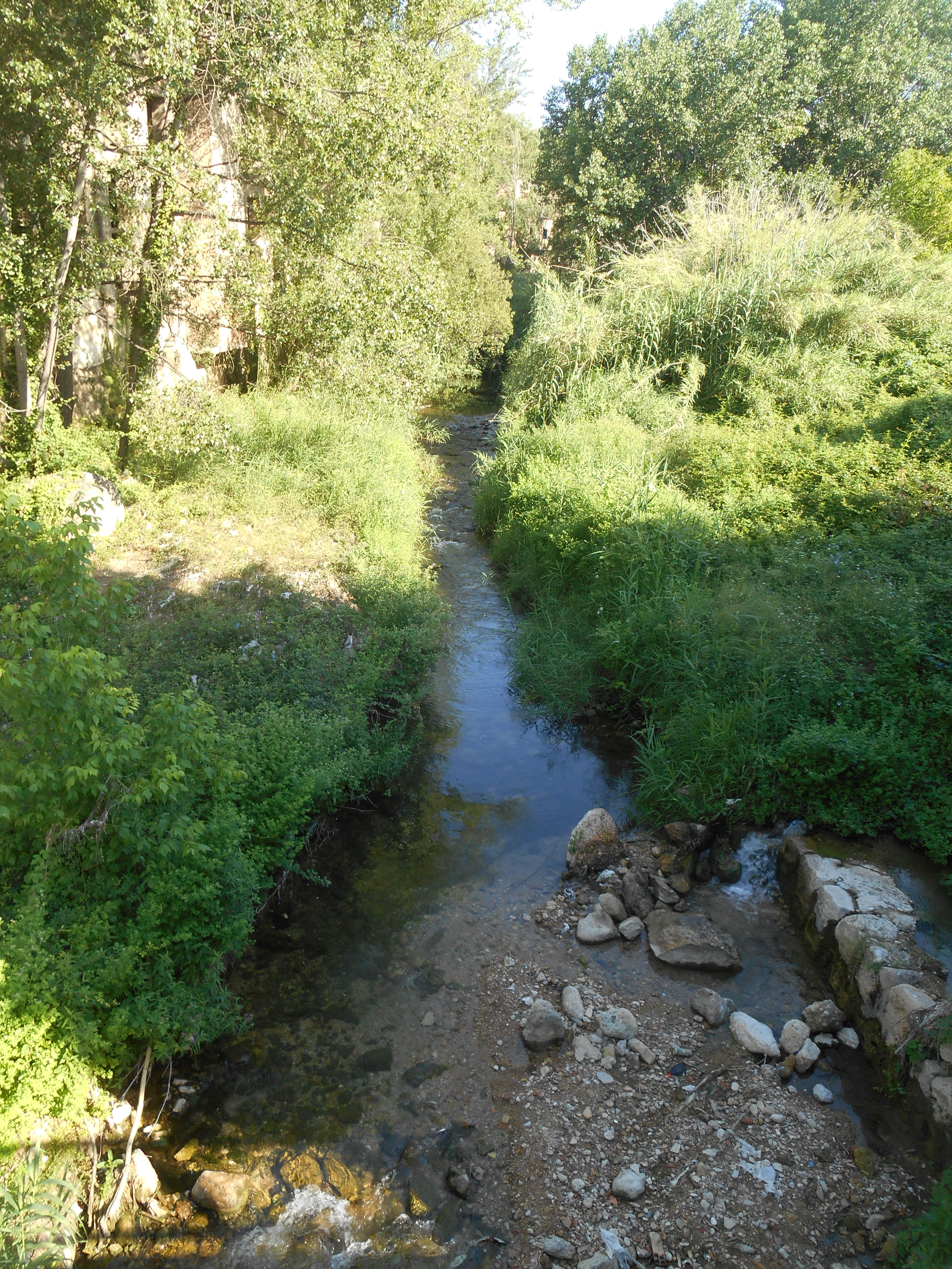 Riu Bunyol des del pont del carrer Vall d'Andorra.